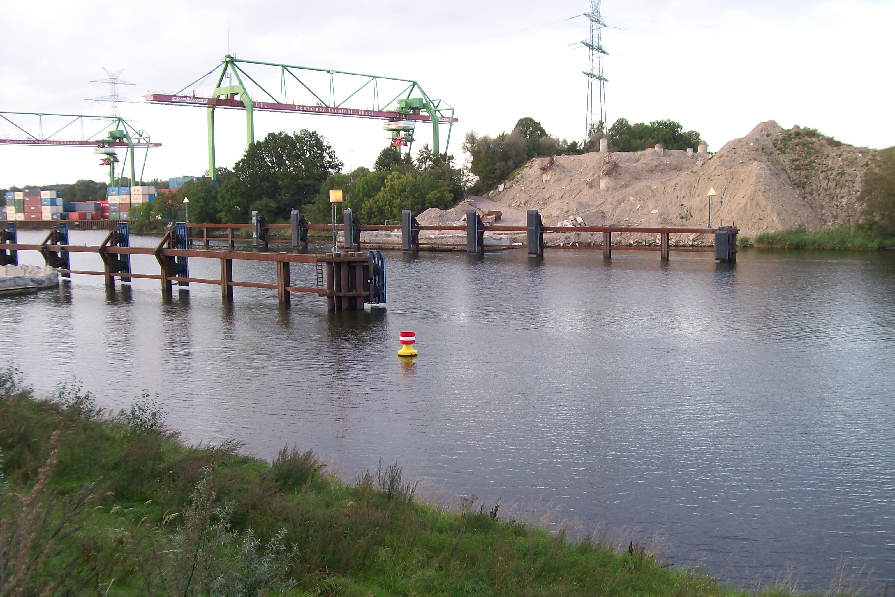 Situation an der Trave in Lübeck-Herrenwyk nach Abriss der Herrenbrücke